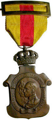 Anverso y reverso de la Medalla conmemorativa del homenaje de los Ayuntamientos a los reyes Alfonso XIII y Victoria Eugenia en 1925